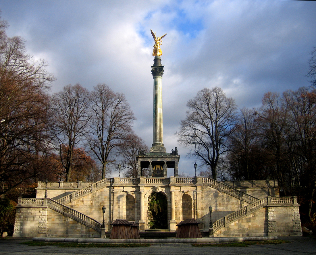 Der Friedensengel in München wurde errichtet am rechten Ufer der Isar an der Luitpoldbrücke. Das Monument wurde gestiftet von der Stadt München anlässlich der 25-jährigen Wiederkehr des Friedensschlusses von Versailles 1871. Der Friedensengel steht in der Achse der Prinzregentenstraße vor einer breiten Treppenanlage. Die schlanke Säule mit dem vergoldeten 6 m hohen Engel ist auf der quadratischen Halle mit Karyatiden angeordnet. Bauzeit 1896 - 1899.